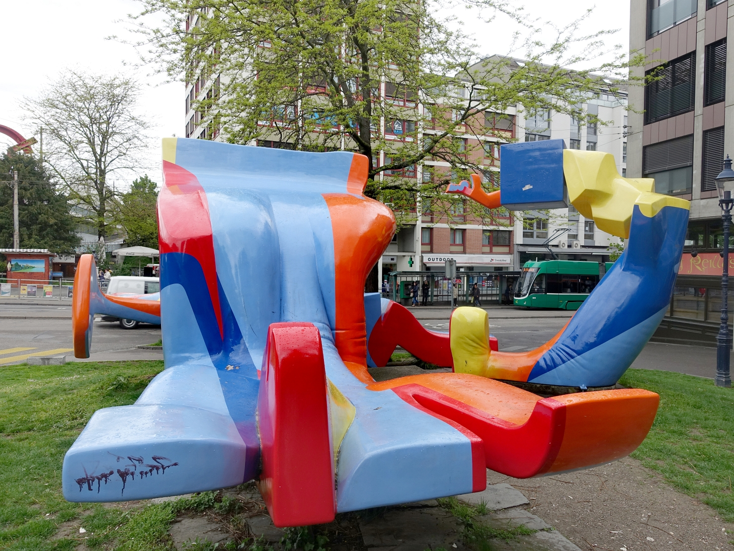 Michael Grossert (1927–2014) Kunststoff Skulptur, Lieu dit, 1975. Die farbige Raumskulptur wurde 1976 vom Basler Kunstkredit angeschafft und an der Heuwaage aufgestellt. Das Werk wurde kurz nach seiner Errichtung von Vandalen beschädigt. Es löste dadurch eine heftige gesellschaftspolitische Debatte über aktuelle Kunst aus.